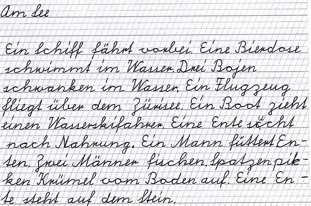 Übungstext in Schweizer Schulschrift, um 2010